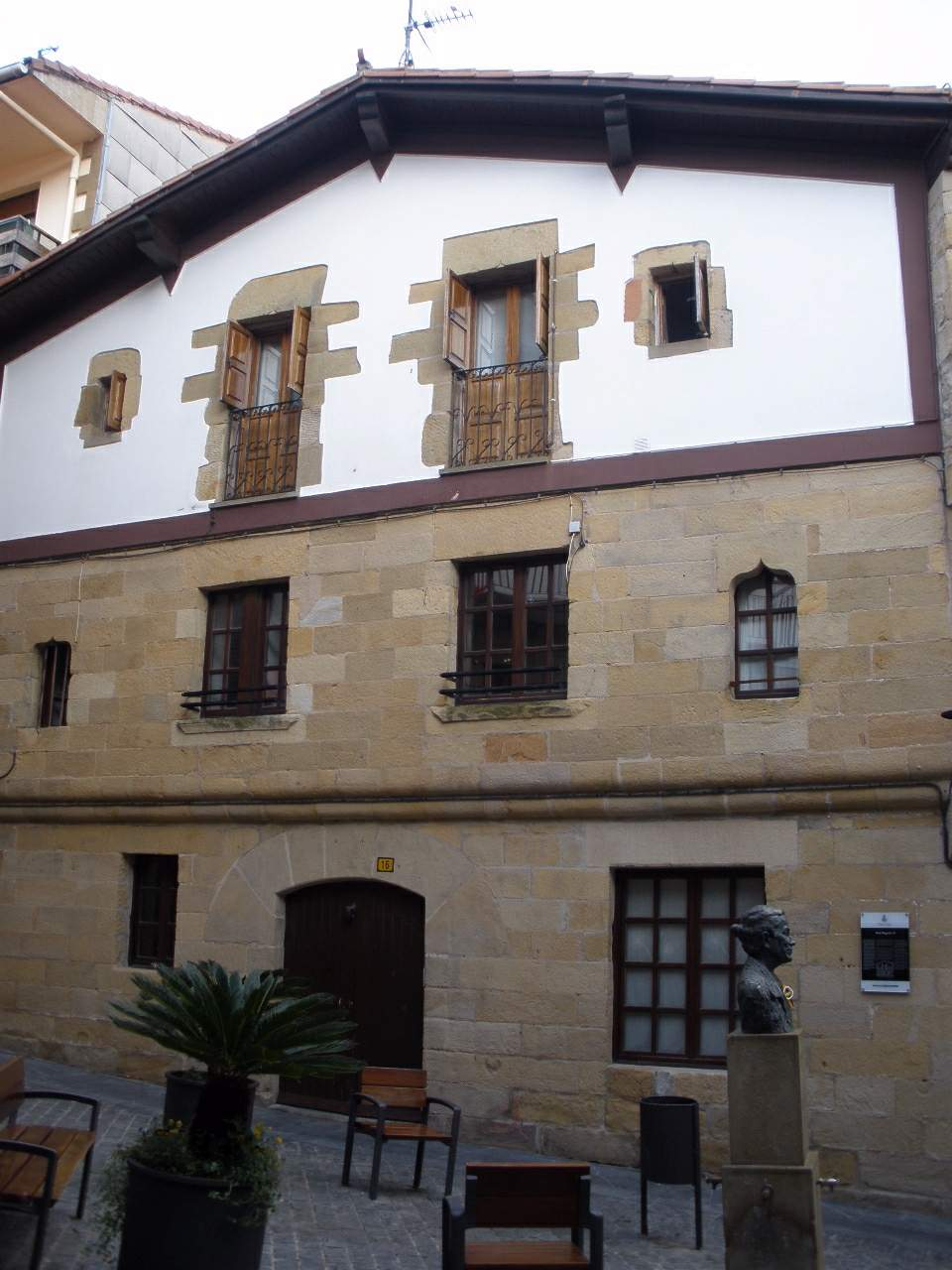 Orio (Gipuzkoa)